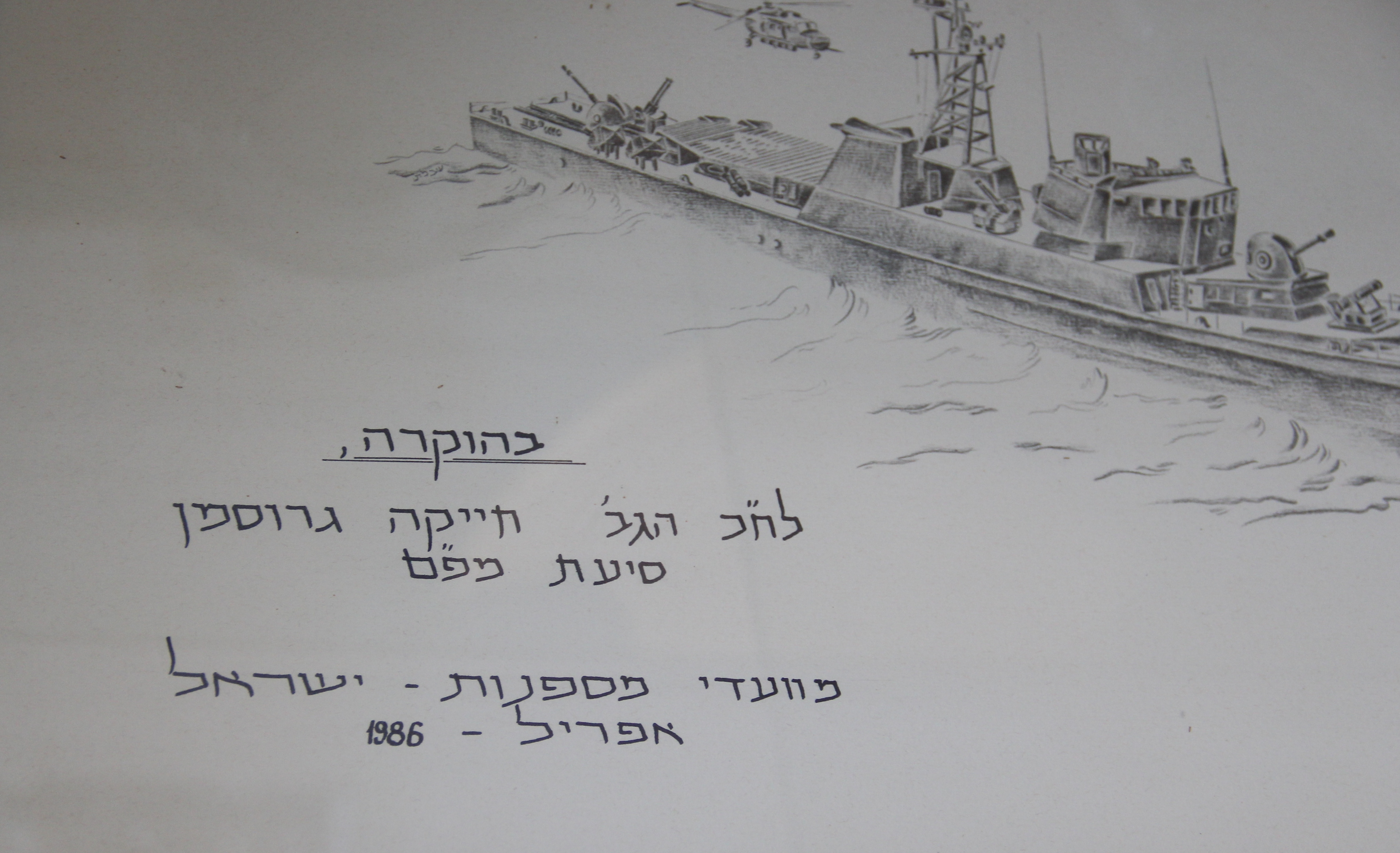 תמונת הוקרה מועד הנמלים לחייקה גרוסמן